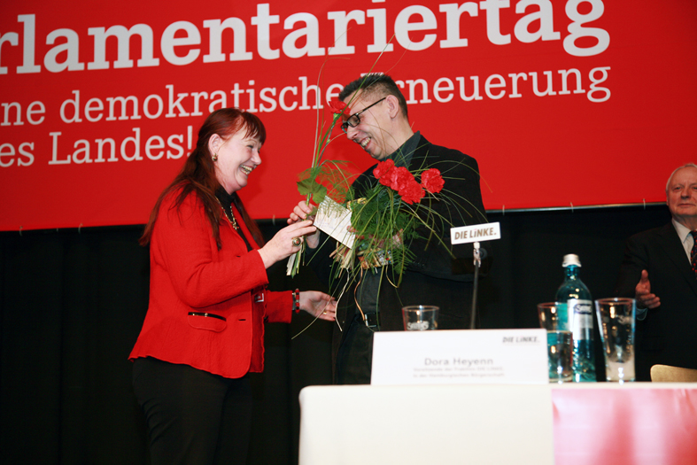 Bärbel Beuermann, Fraktionschefin der Linken in NRW, dankt dem Koordinator der Fraktionsvorsitzendenkonferenz, Gernot Klemm, für dessen Arbeit beim Aufbau der Fraktion in Düsseldorf. Parlamentariertag der LINKEN in Kiel Abgeordnete aus Fraktionen von Landtagen und dem Bundestag treffen sich im Rahmen der Fraktionsvorsitzendenkonferenz der Linken in Kiel